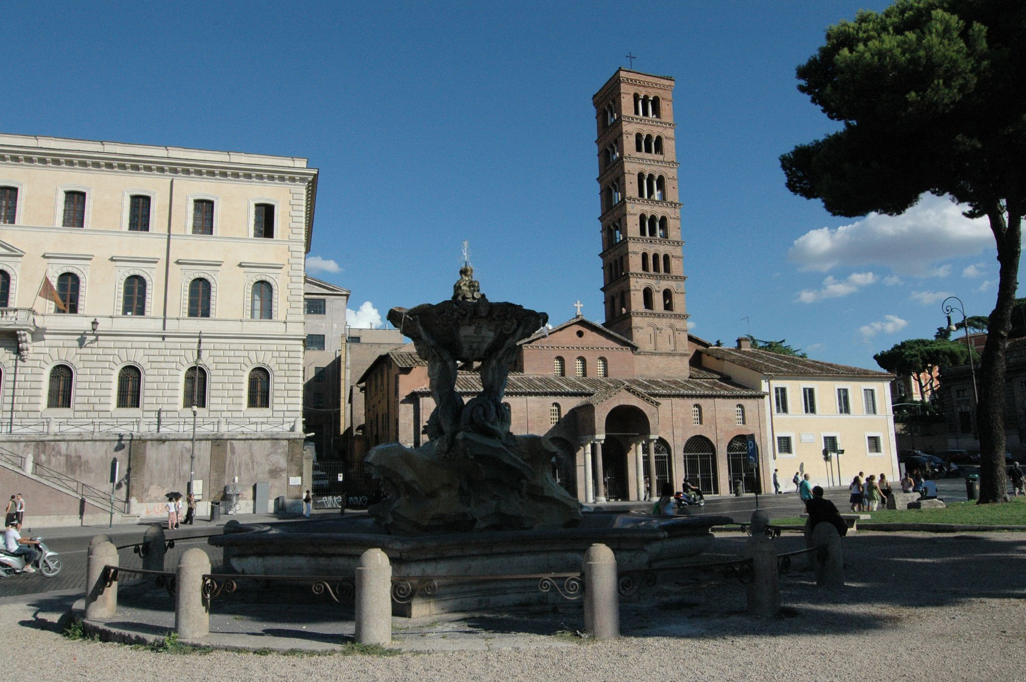 Basilica di Santa Maria in Cosmedin a Roma, nel rione Ripa.